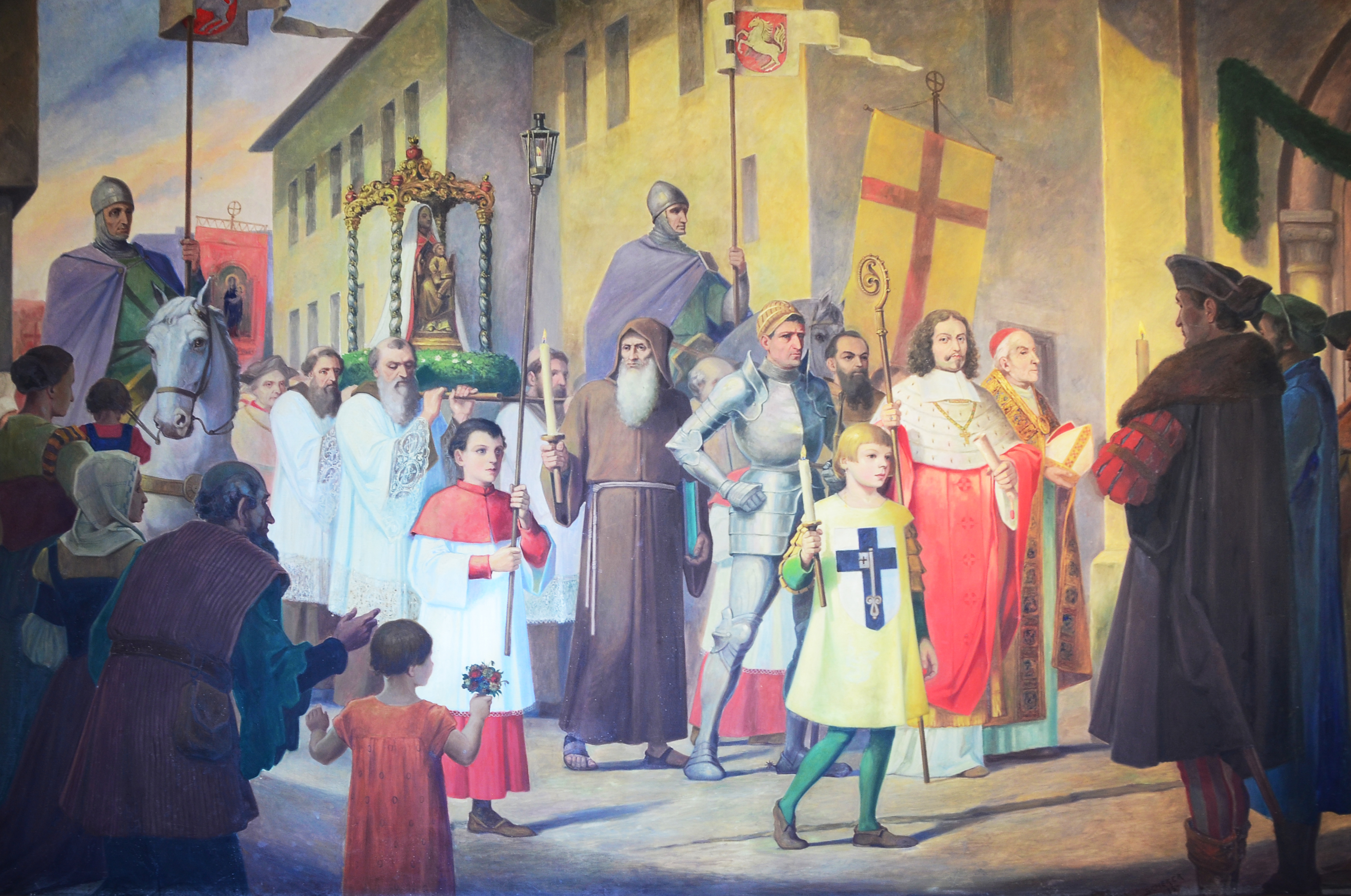 Am 1. November 1661 wurde das Gnadenbild in einer feierlichen Prozession von Soest,wo es früher in der Wiesenkirche verehrt wurde, nach Werl von Erzbischof Maximilian Heinrich von Köln den Kapuzinern übergeben.